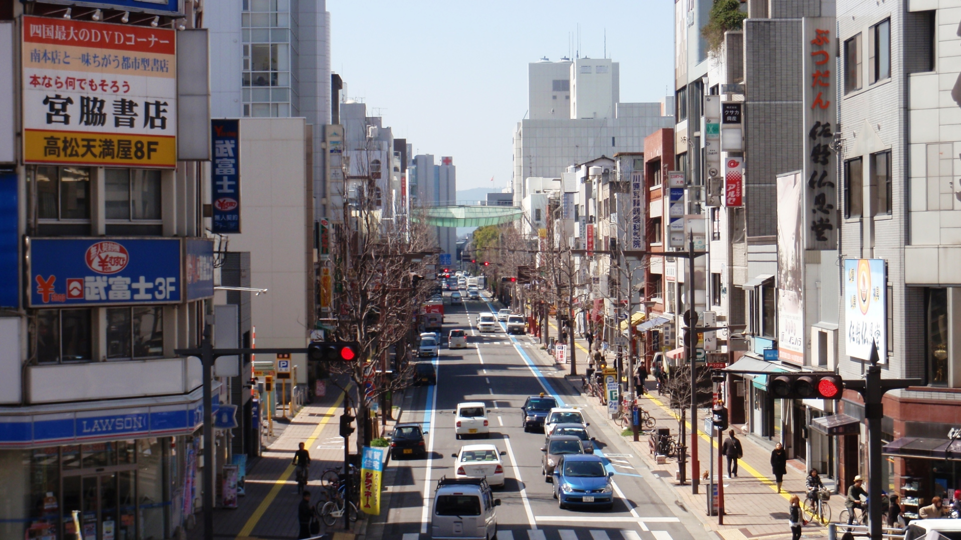 香川県高松市の菊池寛通り。ことでん瓦町駅前のペデストリアンデッキ上から望む。